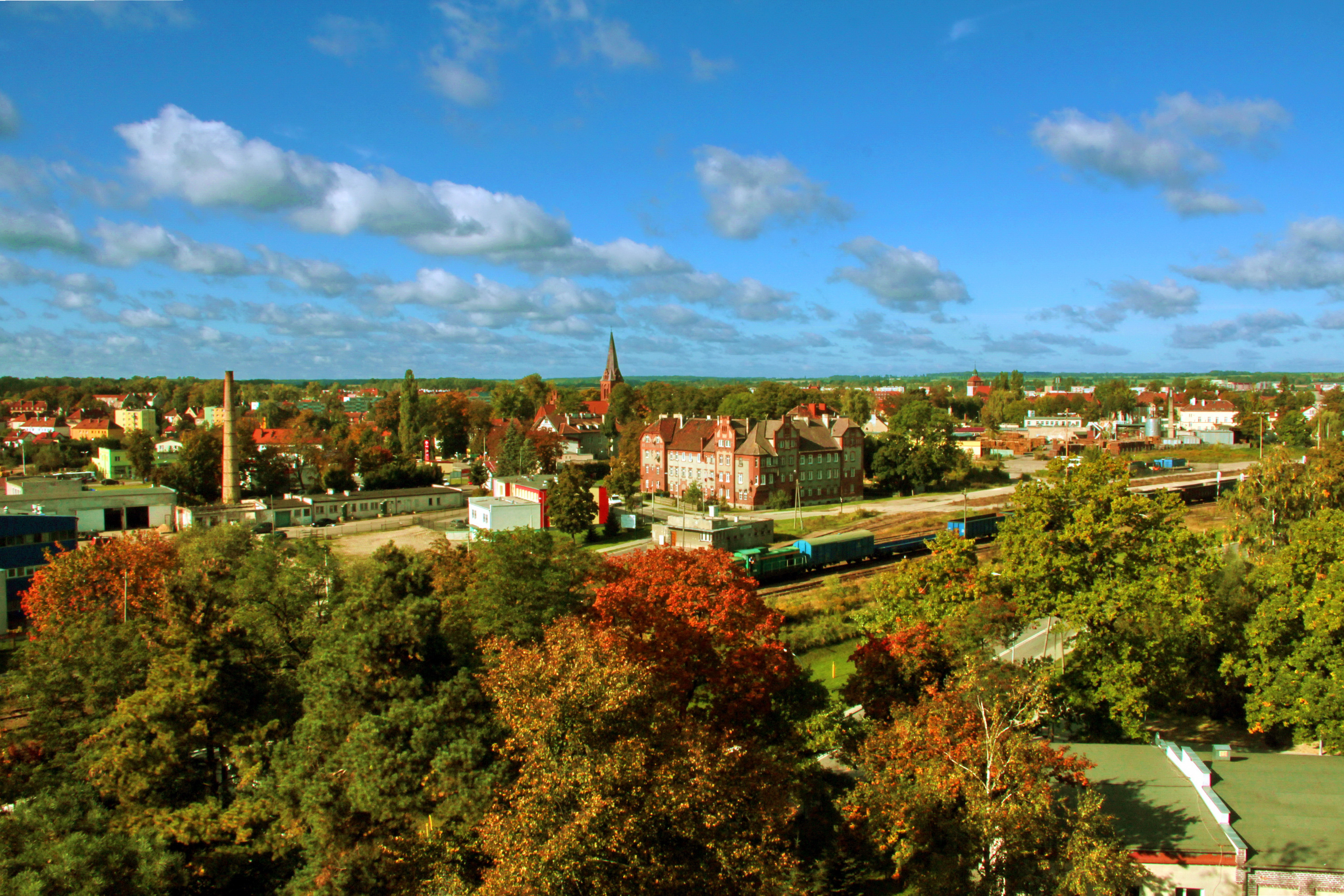 Bartoszyce. Widok na miasto z wodociągowej wieży ciśnień.